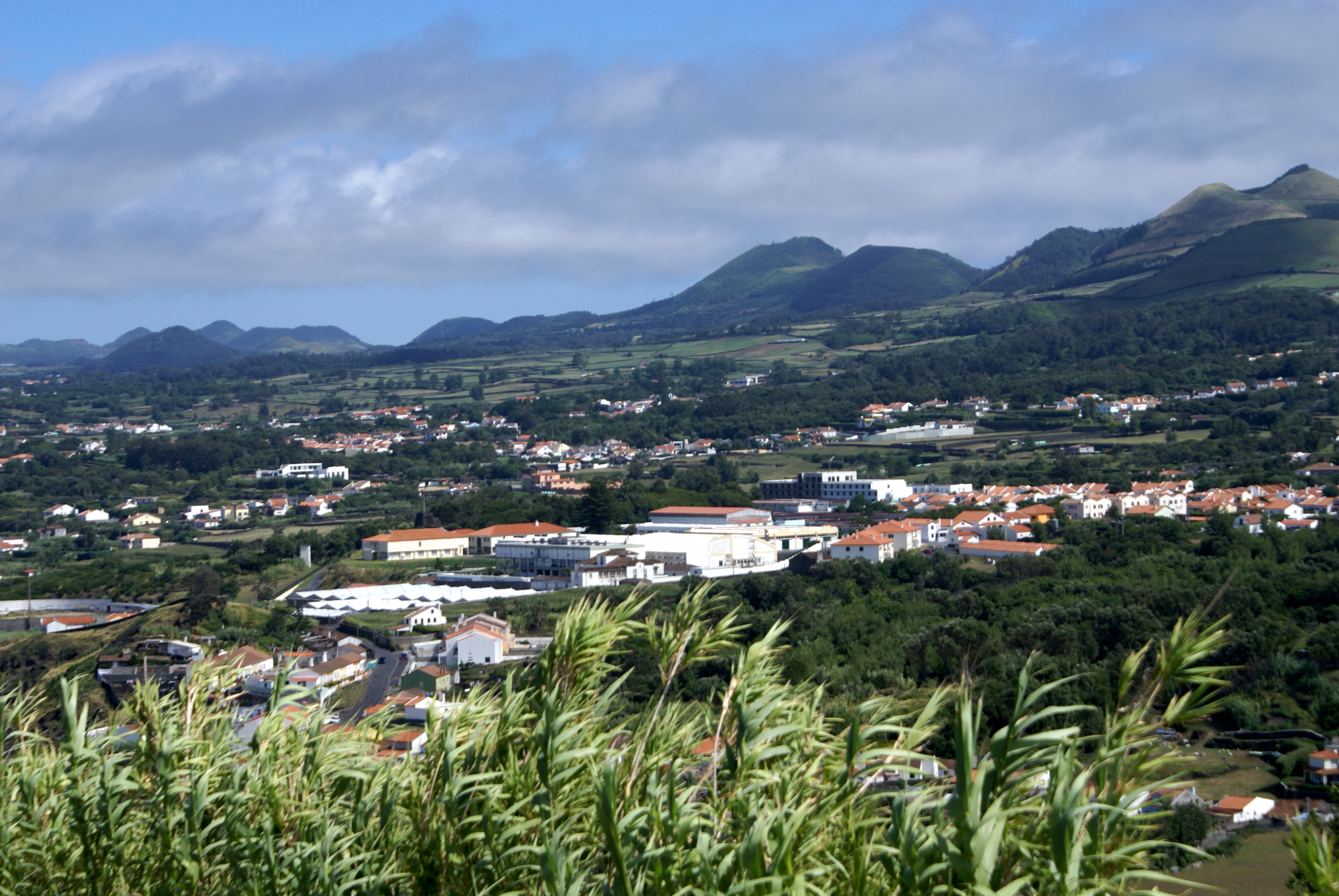 Capelas, vista do Miradouro da Vigia da Baleia, Ponta Delgada, Açores